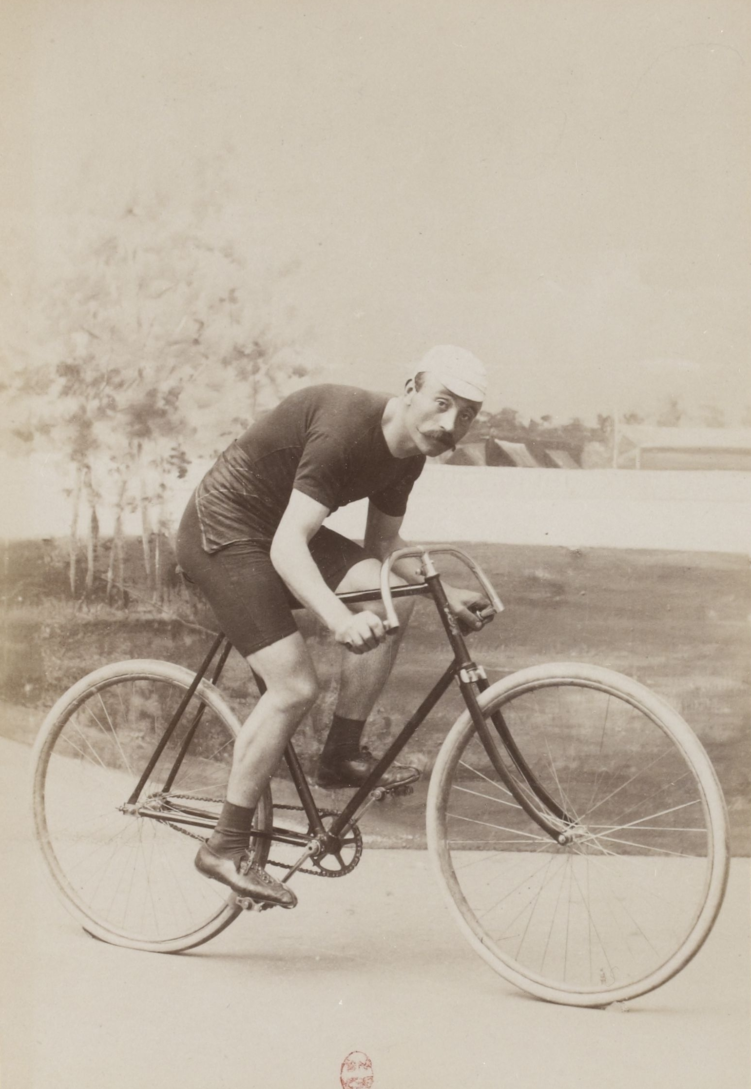 [Collection Jules Beau. Photographie sportive] : T. 6. Année 1898 / Jules Beau : F. 47v. Lumsden ; Max Lebaudy